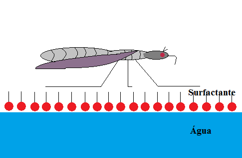 Marangoni Propultion ilustration